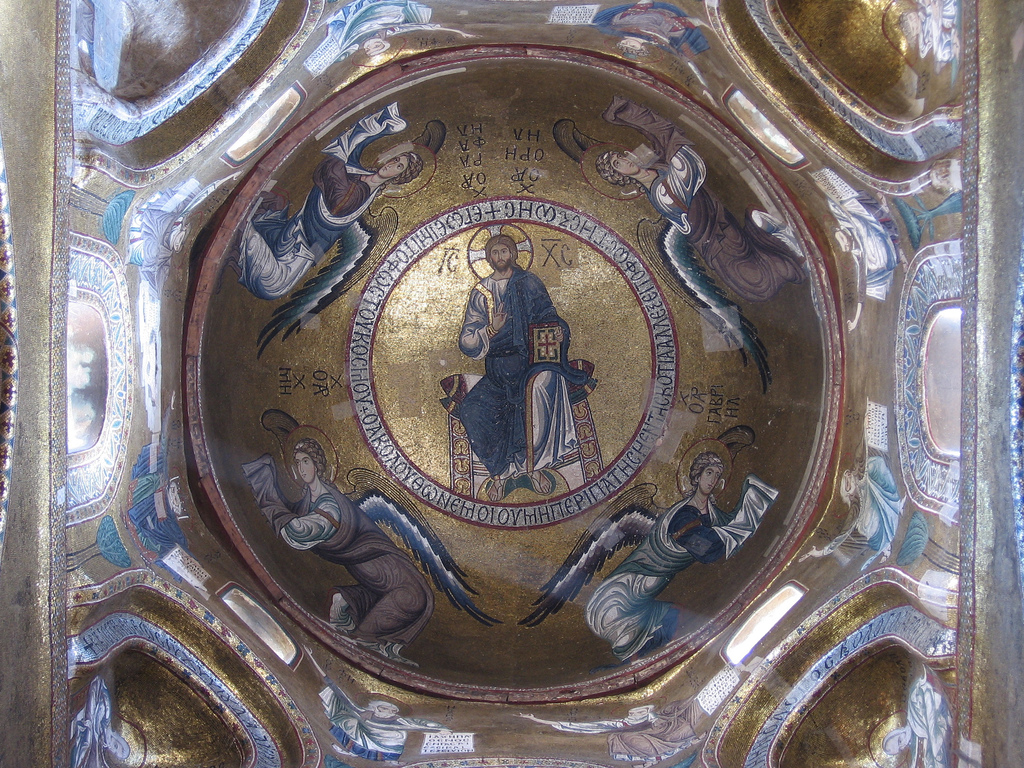 Chiesa della MartoranaPalermo capodanno 2006-07